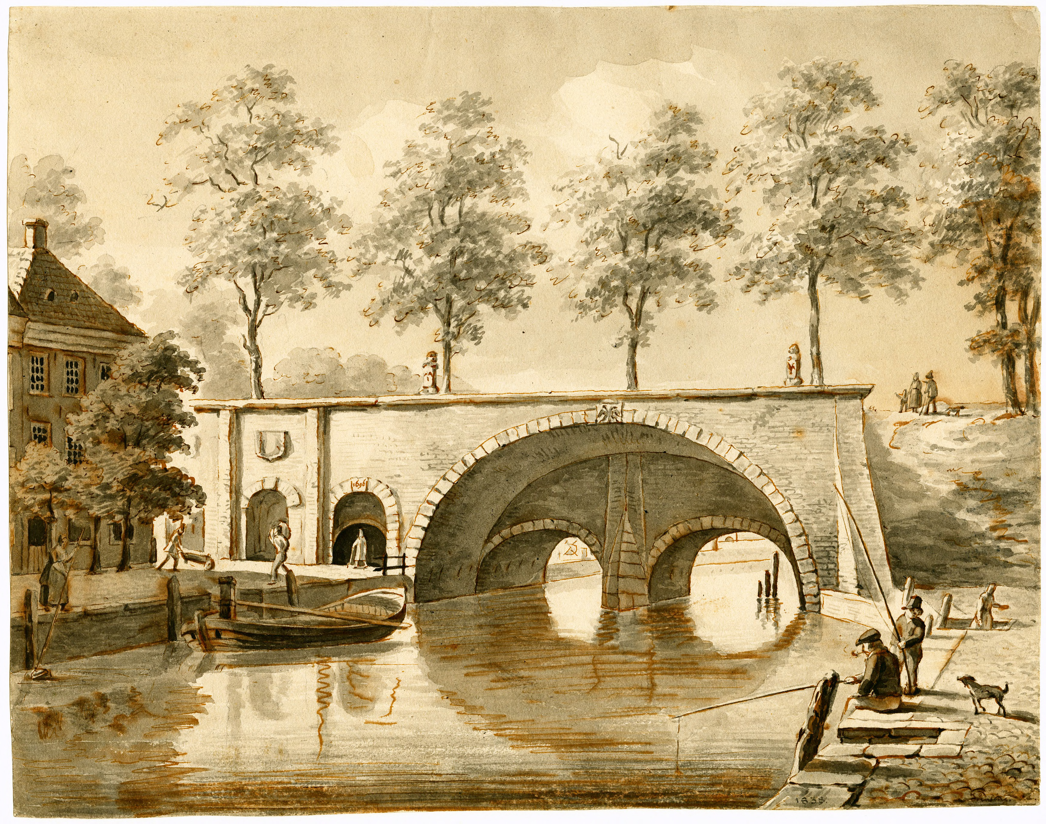 Het Klein Poortje met de Drenkelaarspijpen vóór 1838, toen de Drenkelaarspijpen afgebroken werden.